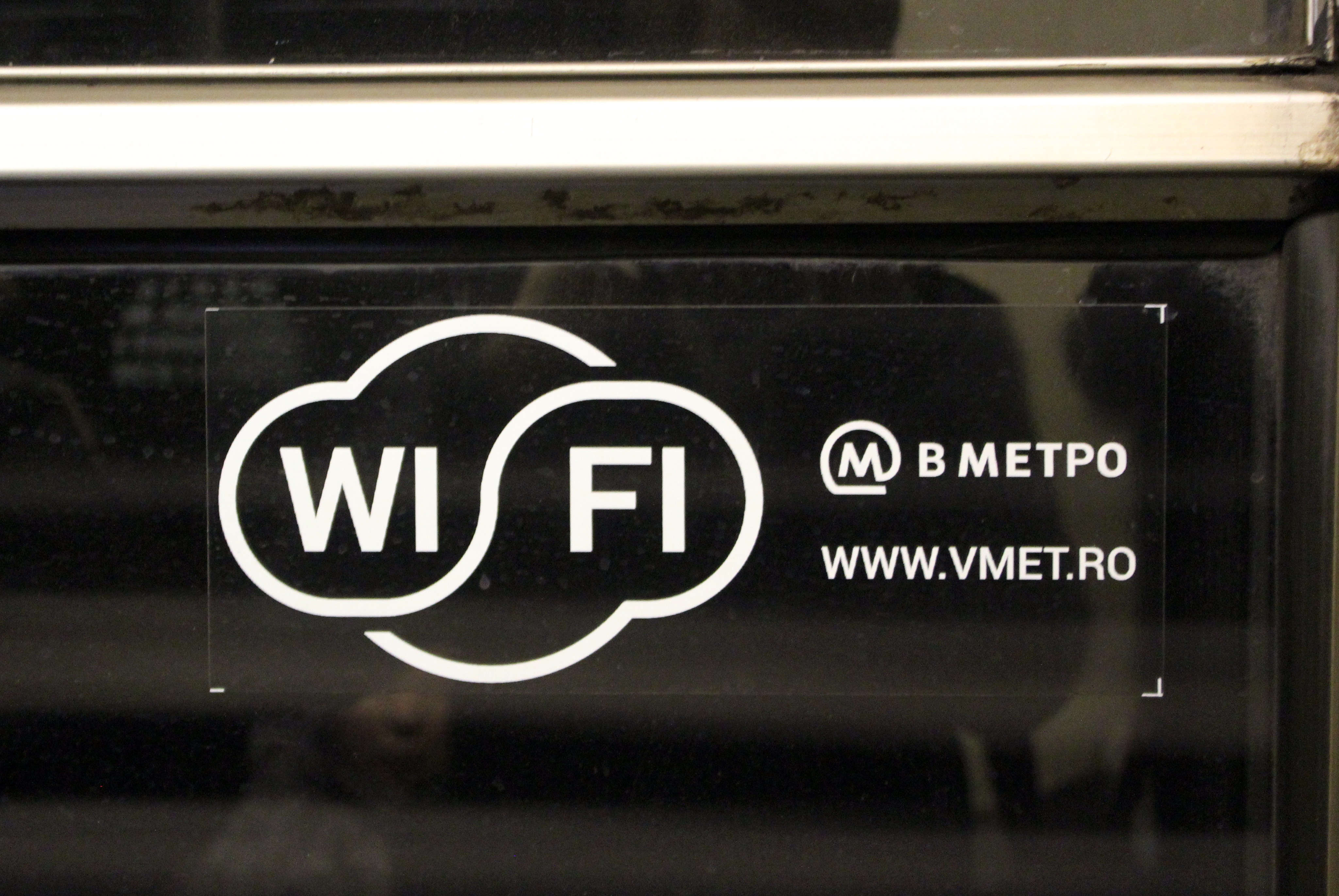 Знак Wi-Fi в вагоне метро в Москве